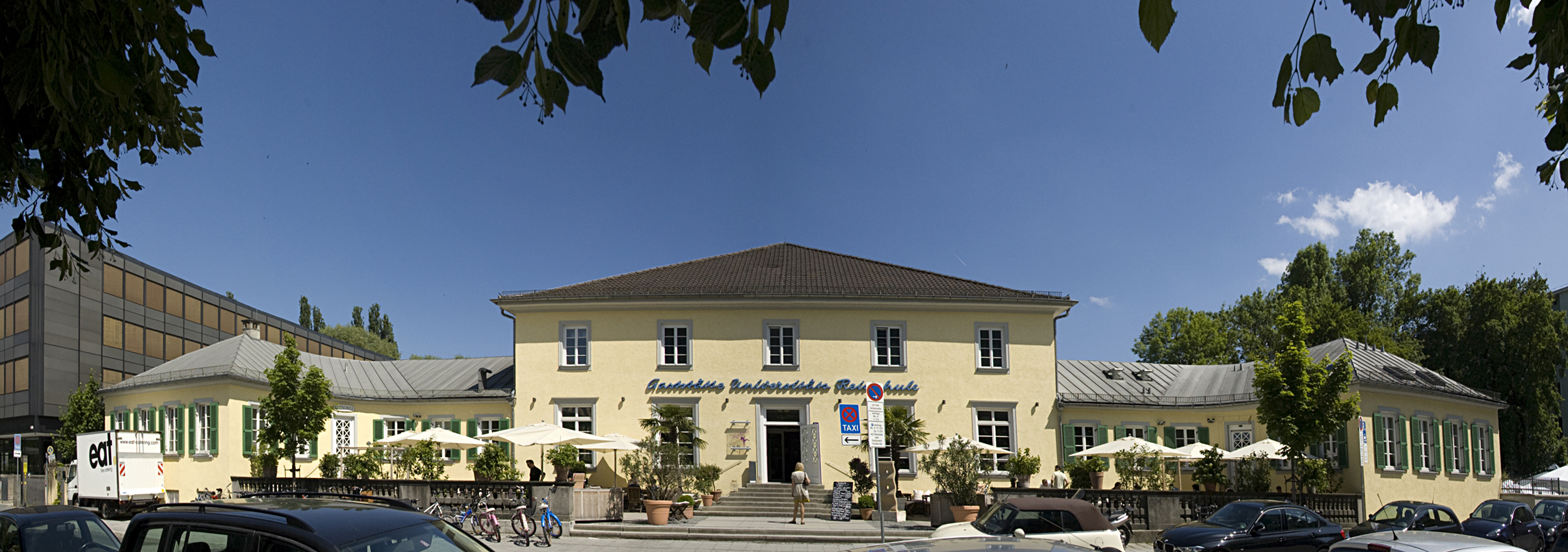 Königinstraße 34, Universitätsreitschule, schlichter, neuklassizistischer, herrenhausartiger Flügelbau mit den Vorhof begrenzender Balustrade, 1927 von Eugen Hönig und Carl Söldner.